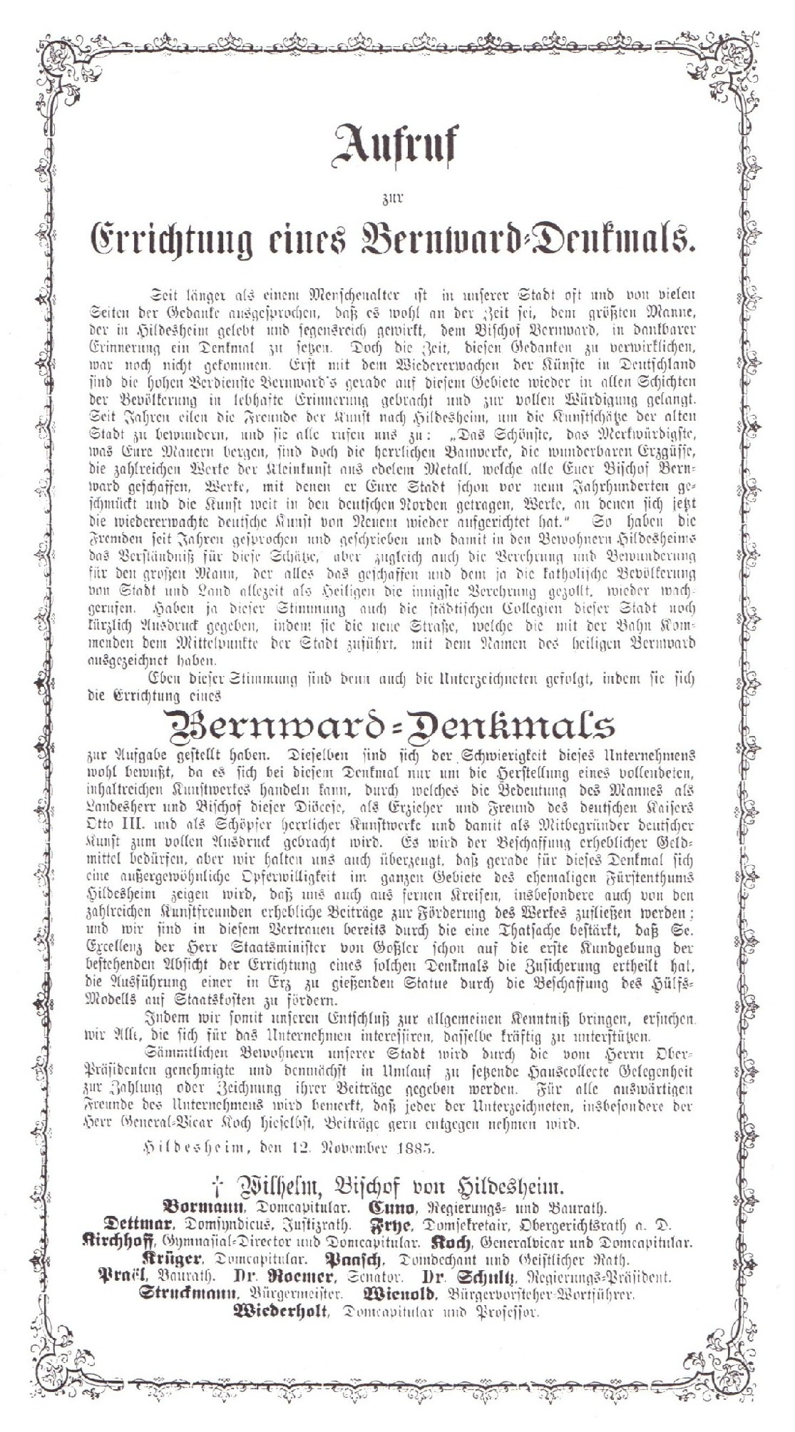 Aufruf zur Schaffung des Bernwardsdenkmals 1885